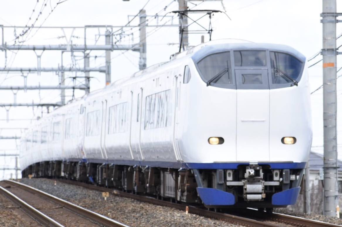 関西空港特急はるか号 阪和線石才踏切にて撮影